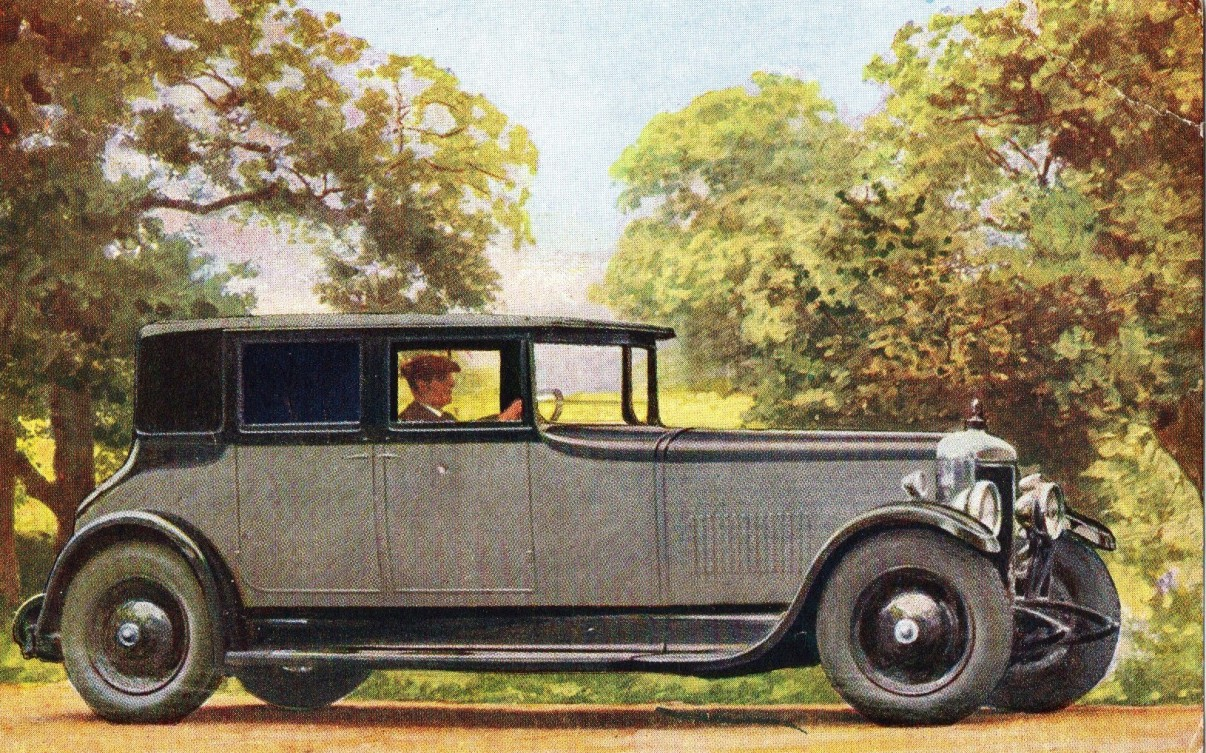 1926 Daimler Double-Six Saloon